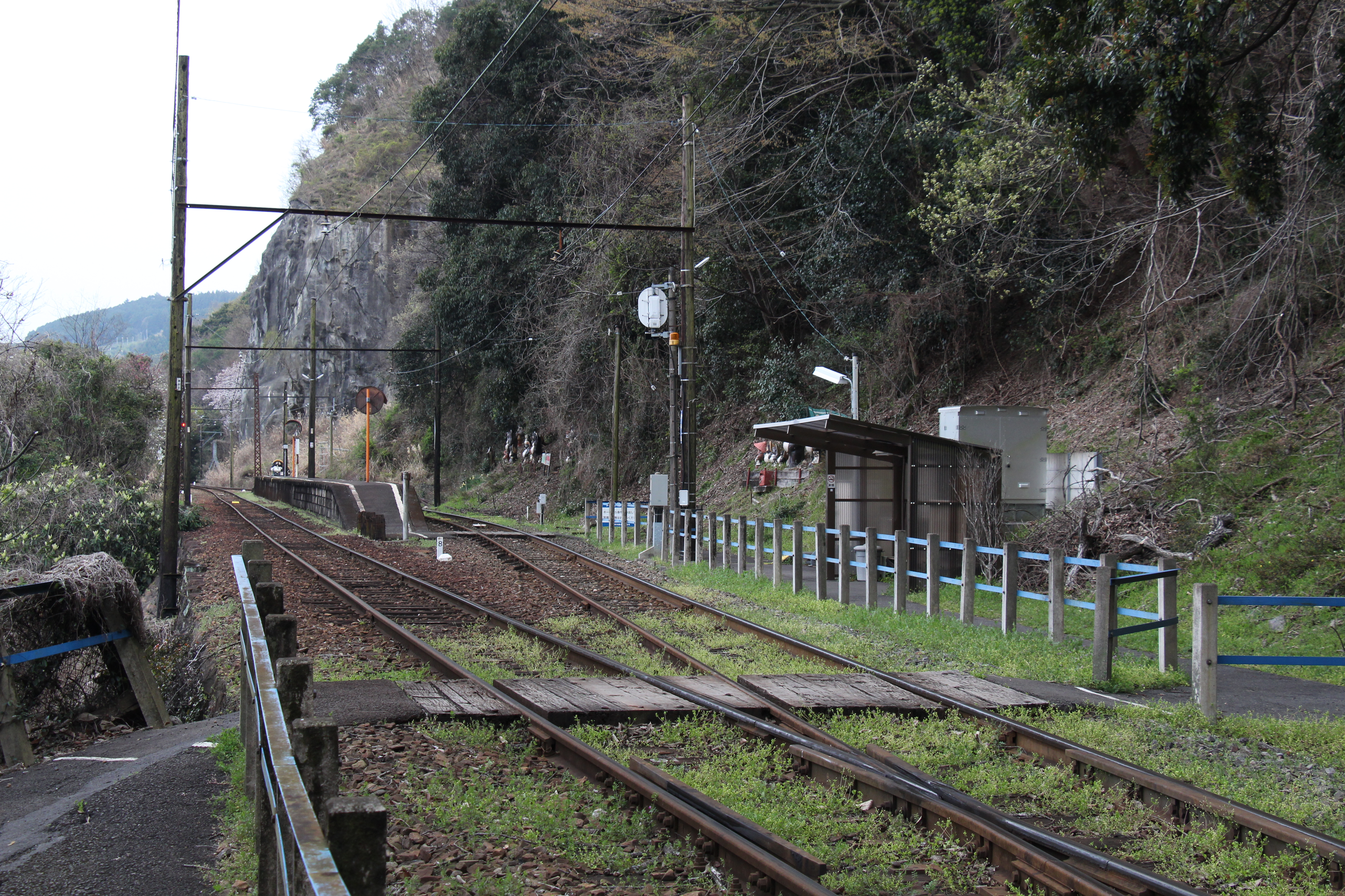 神尾駅の旧駅舎付近からプラットホームや待合所などを望む。 公道からプラットホームへは、手前に見える踏切で待合所側へ渡り、奥に見える踏切でプラットホームへ渡る必要がある。